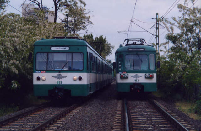 A csepeli HÉV szerelvényei (A vonatokon a később megszüntetett kiemelt minőségű szolgáltatásokat jelölő BKV+ logo látható.)